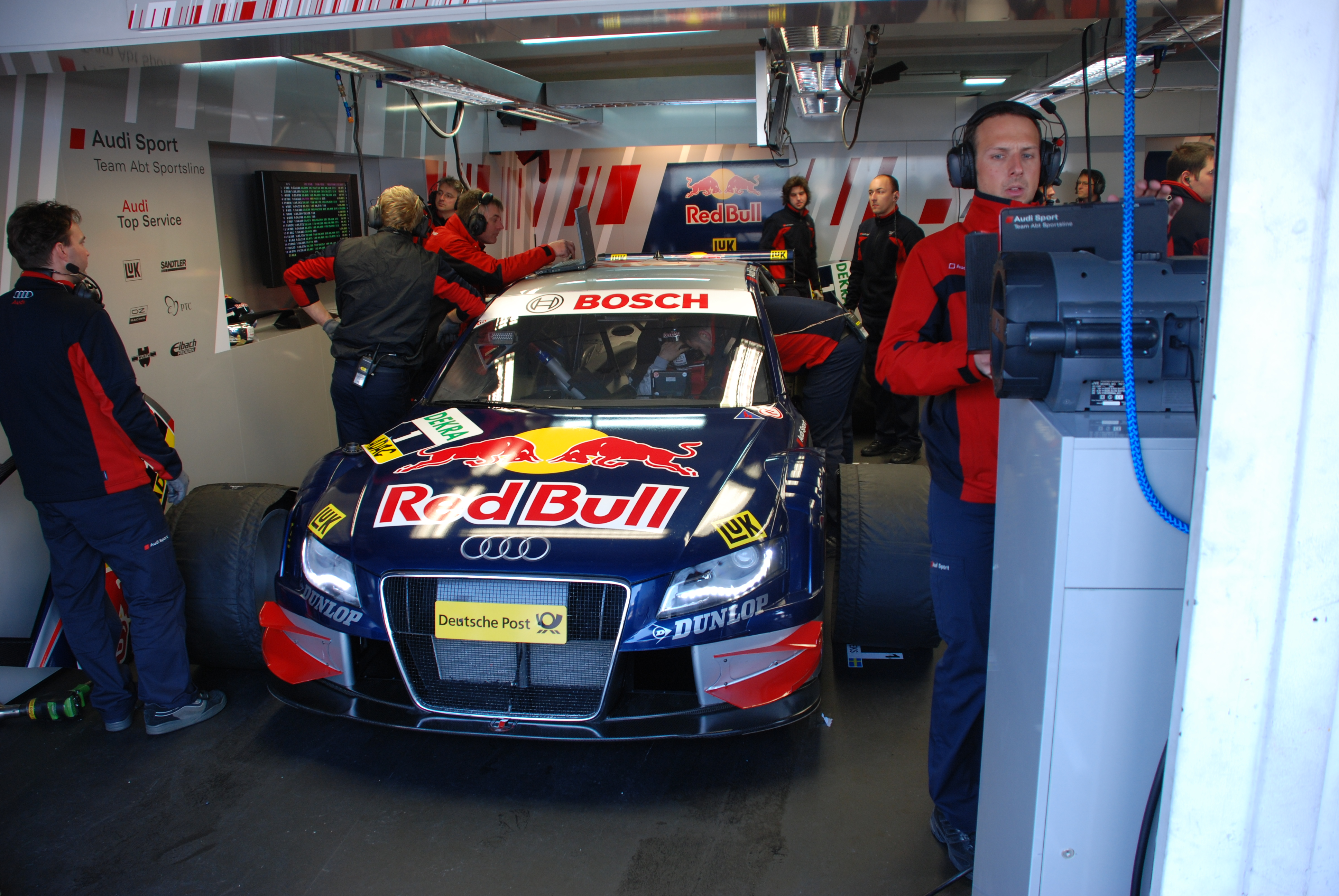 Audi A4-DTM in der Box von Abt Sportsline, beim Training zum Rennen in Hockenheim am 12. April 2008. Das Auto des amtierenden DTM Meister Mattias Ekström.